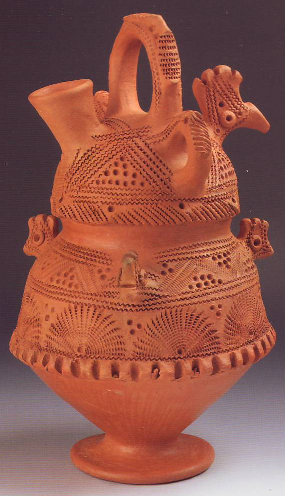 Botijo ornamental con incisiones, en arcilla roja. Alfarería tradicional rifeña (Sierra del Rif, Marruecos). Colección del Museo del Botijo de Toral de los Guzmanes (León, España).